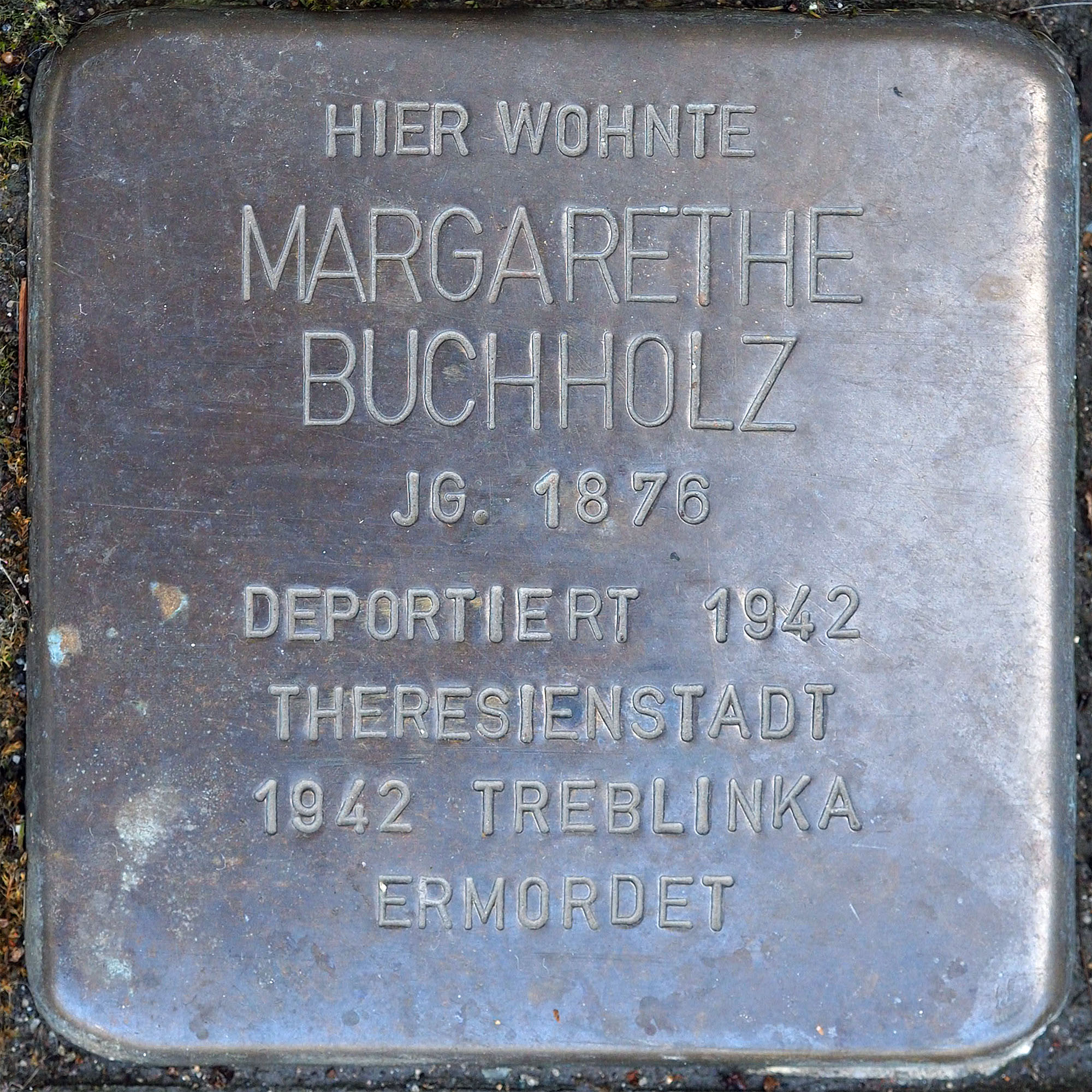 Stolpersteine MG: Buchholz, Margarethe